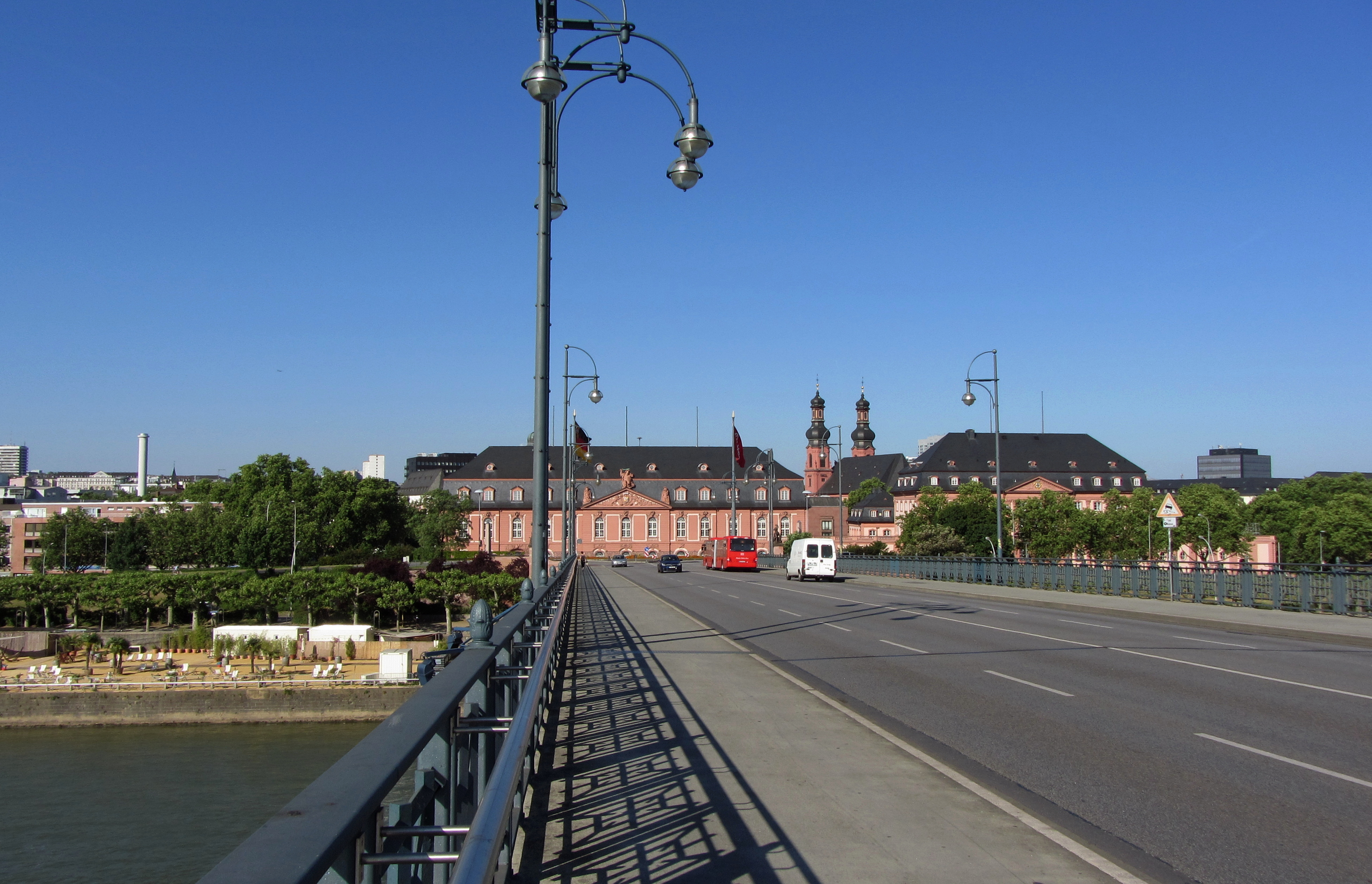 Mainz. Blick von der Theodor-Heuss-Brücke auf die Staatskanzlei im Neuen Zeughaus.